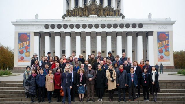 Фото участников